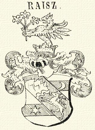 Raiss család (kassai) címere